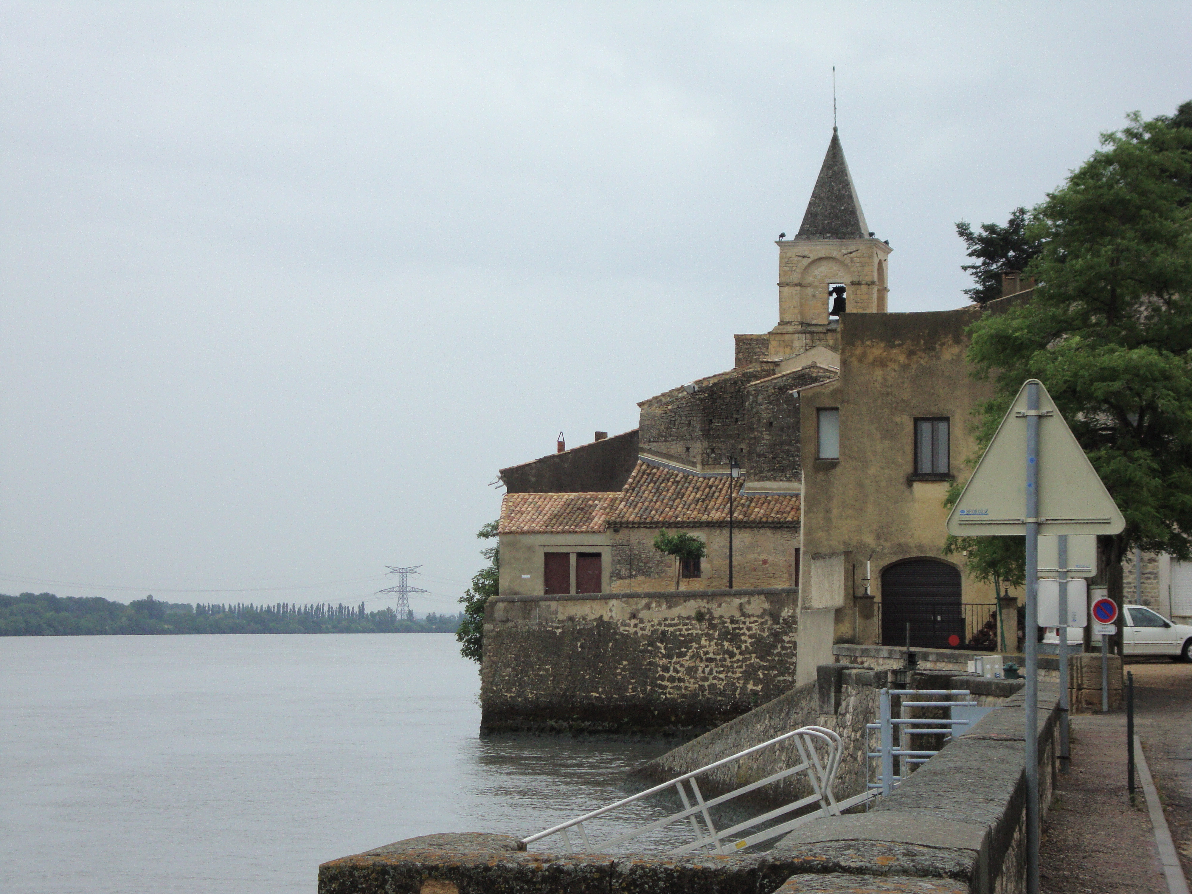 St.Etienne-des-Sorts (Gard, Fr) village au bord du Rhône.